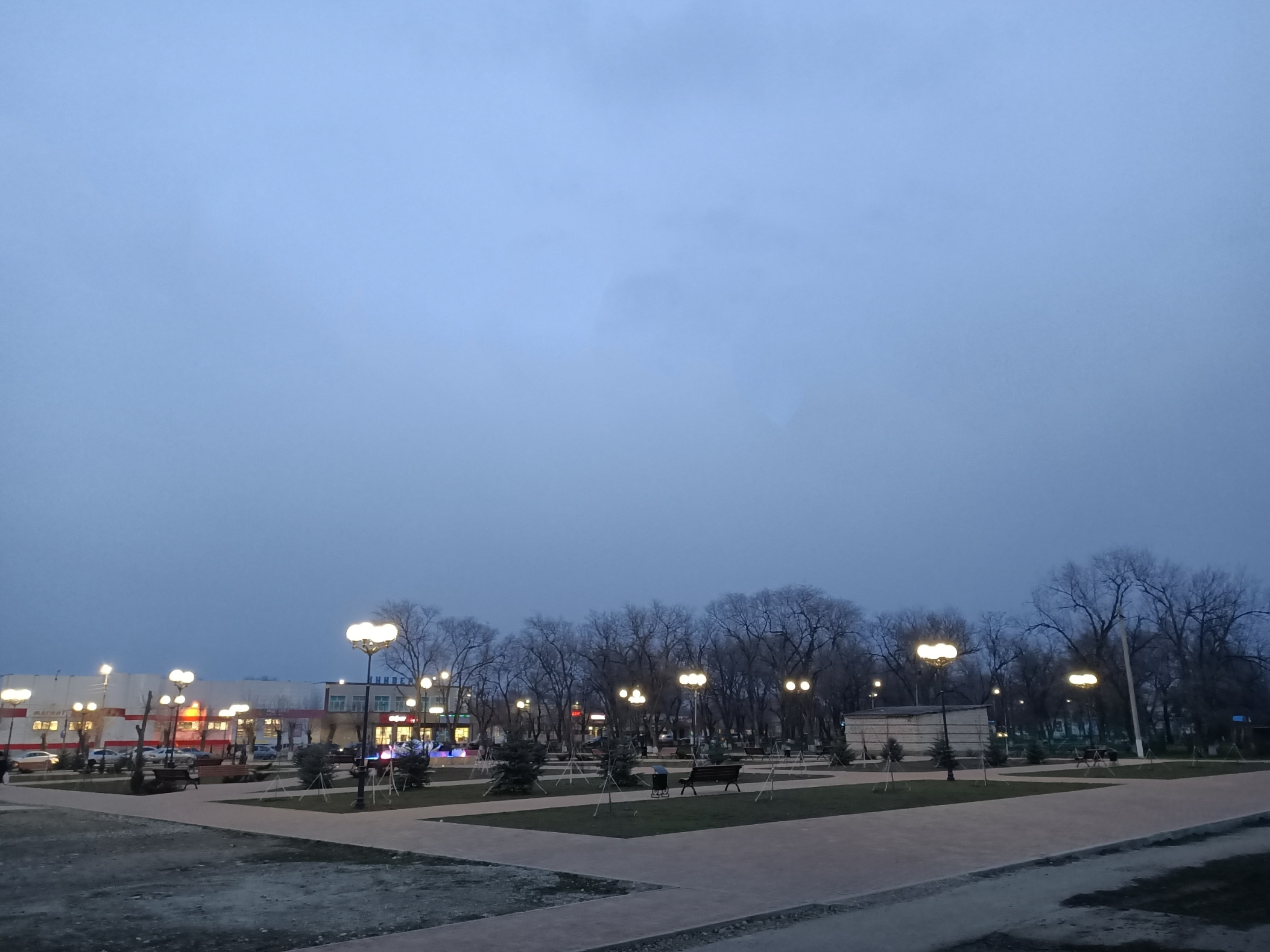 Вечернее фото с изображением площади в центре города. "Лужайка лотосов" открылась в 2019 году и сразу очень полюбилась горожанами и гостями города